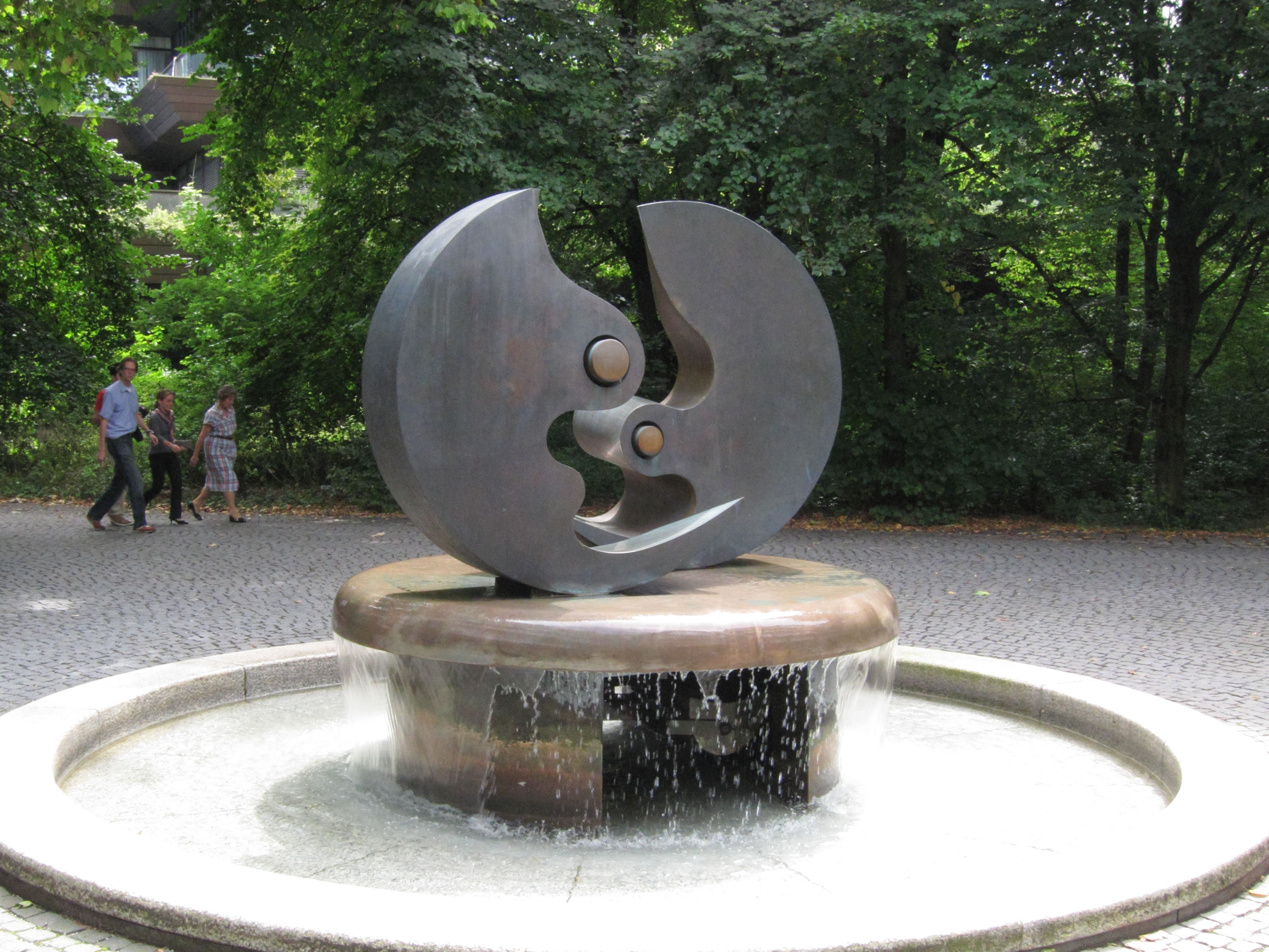 "Ying-Yang" Brunnen von Otto Wesendonck, 1985-86; Bronze, 250 cm x 560 cm x 560 cm; Hypovereinsbank, Sederanger 5, München-Tucherpark